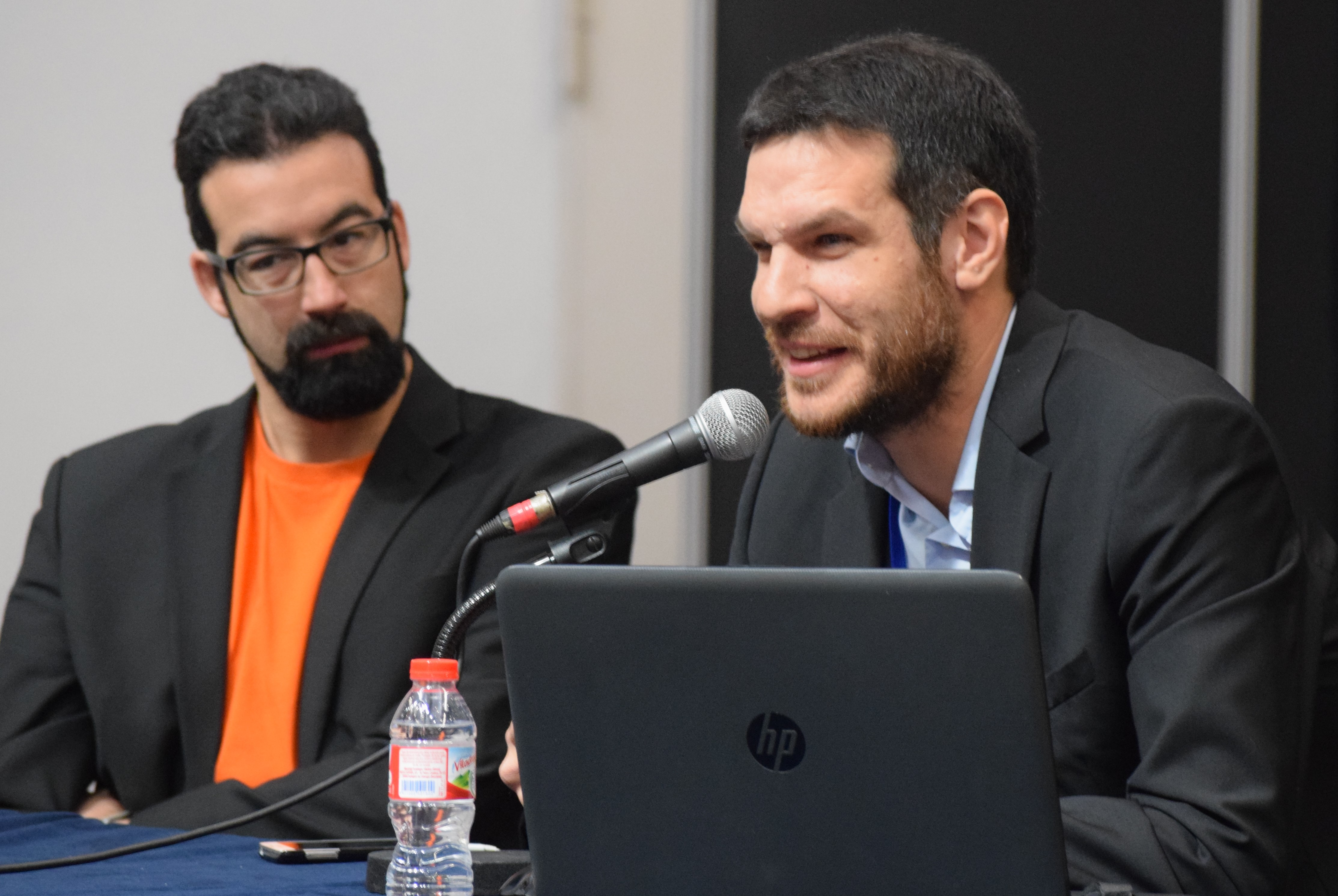 El periodista Joan Ramon Armadàs i l'expert en manga Orial Estrada a la conferència "El bullying al manga: assetjament escolar al Japó a través dels còmics". Saló Internacional del Còmic de Barcelona de 2017. Dijous 30 de març de 2017.